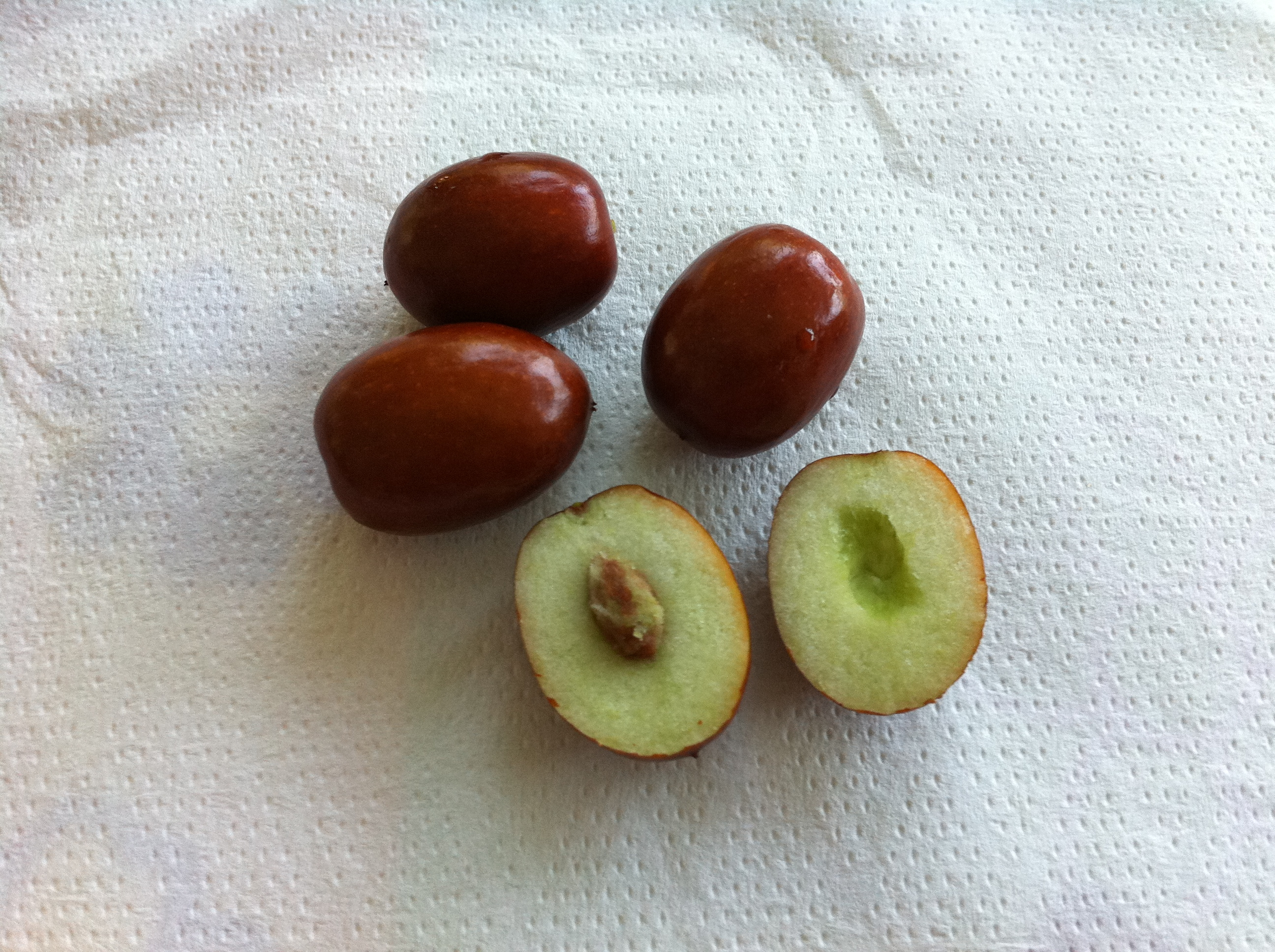 Fruto fresco del azofaifo (Ziziphus zizyphus), se aprecia pulpa y semilla.